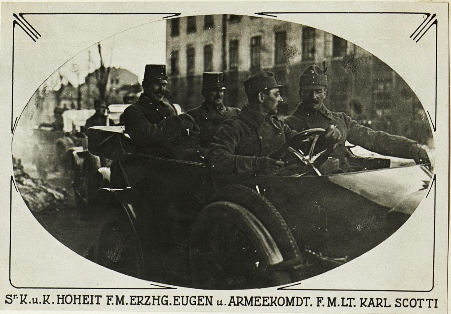 Sr.K.u.K. HOHEIT F.M.ERZHG.EUGEN u.ARMEEKOMDT.F.M.LT.KARL SCOTTI